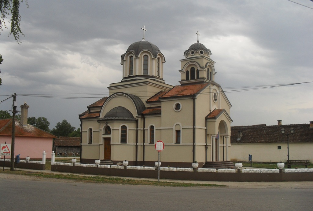 Српска православна црква Вазнесења Господњег у Салашу Црнобарском, Мачва, Србија